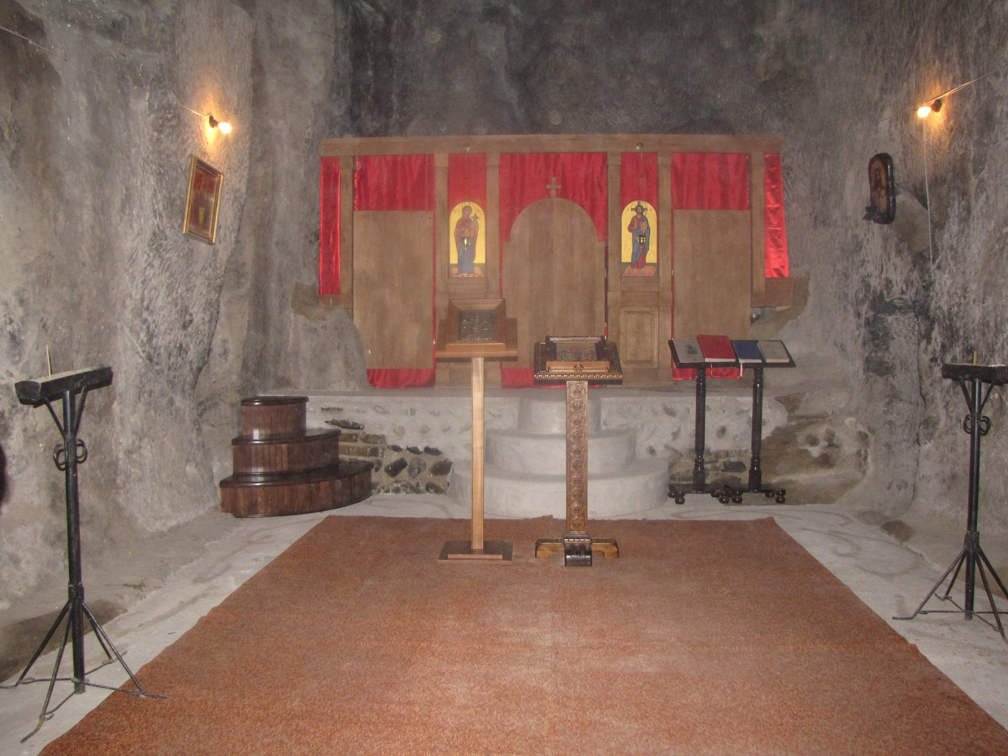 კვირაცხოვლის სახელობის ეკლესია სოფელ ქვახვრელში